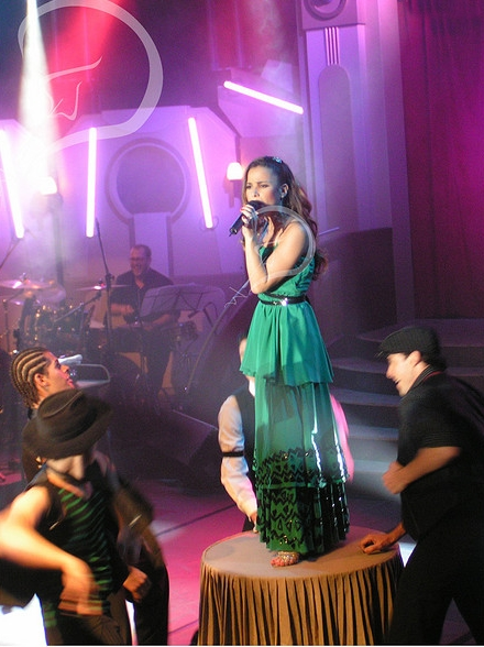 Wanessa durante o show da W in Tour... Era Uma Vez (2006)